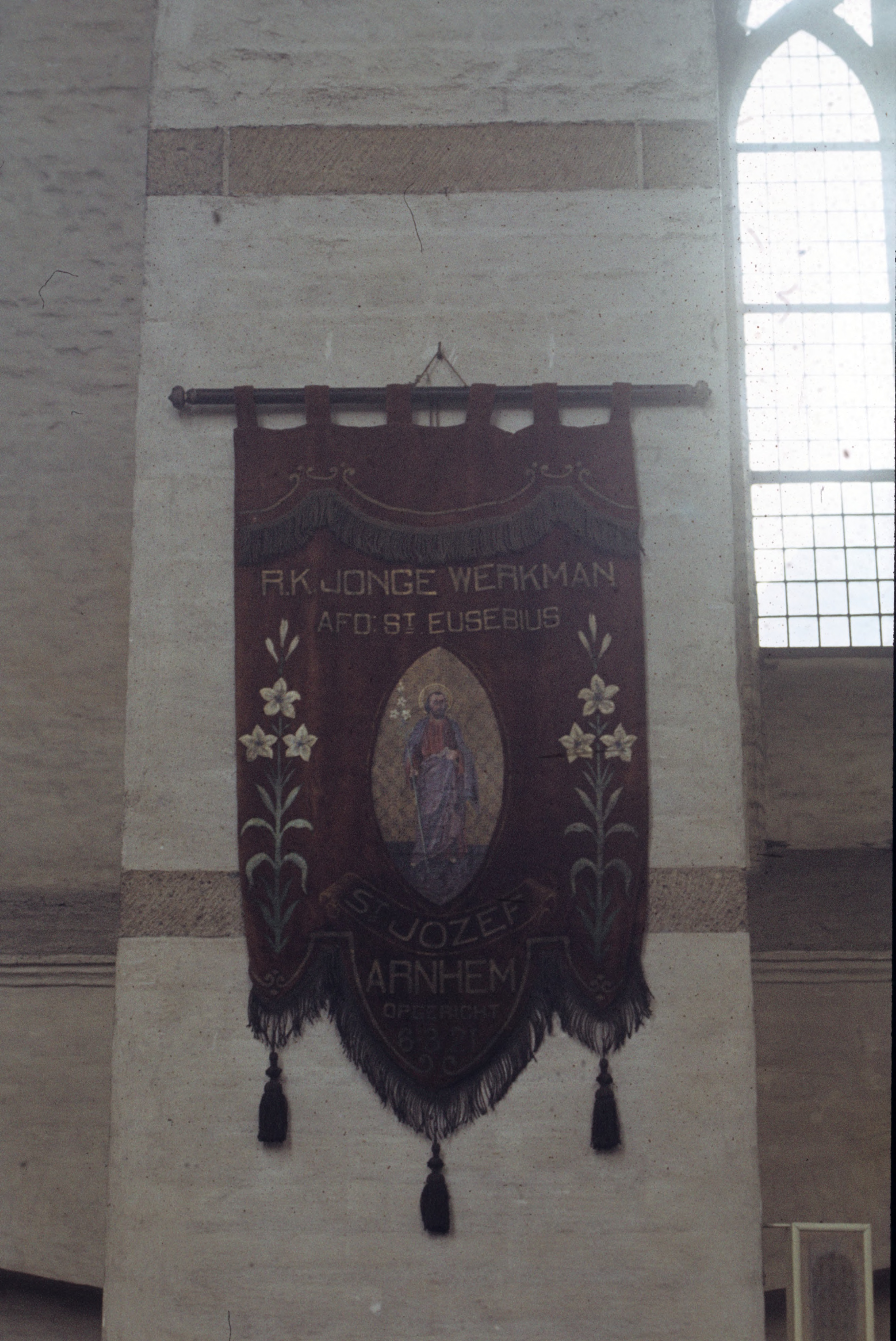 Vaandel R.K. Jonge Werkman Afd. St. Eusebius in de Sint-Walburgiskerk te Arnhem, ca. 1985. Gelders Archief 1524 - 11167